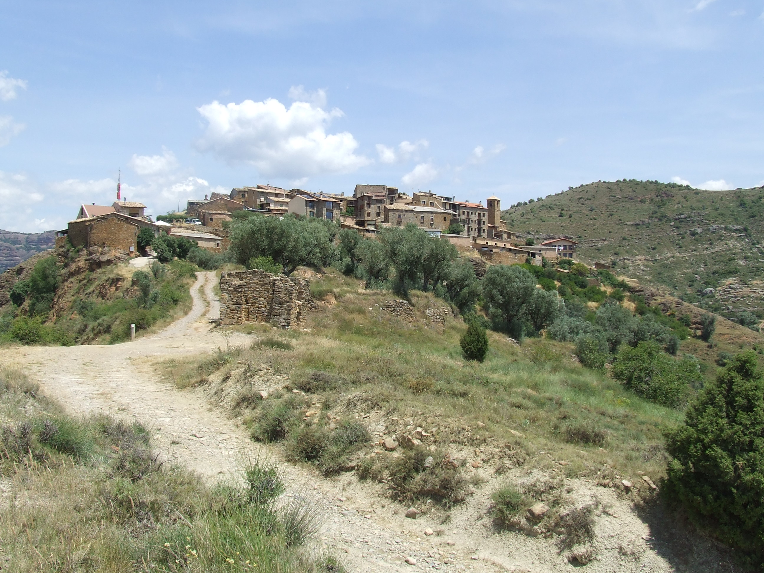 Claverol, des de migdia (Conca de Dalt, Pallars Jussà9